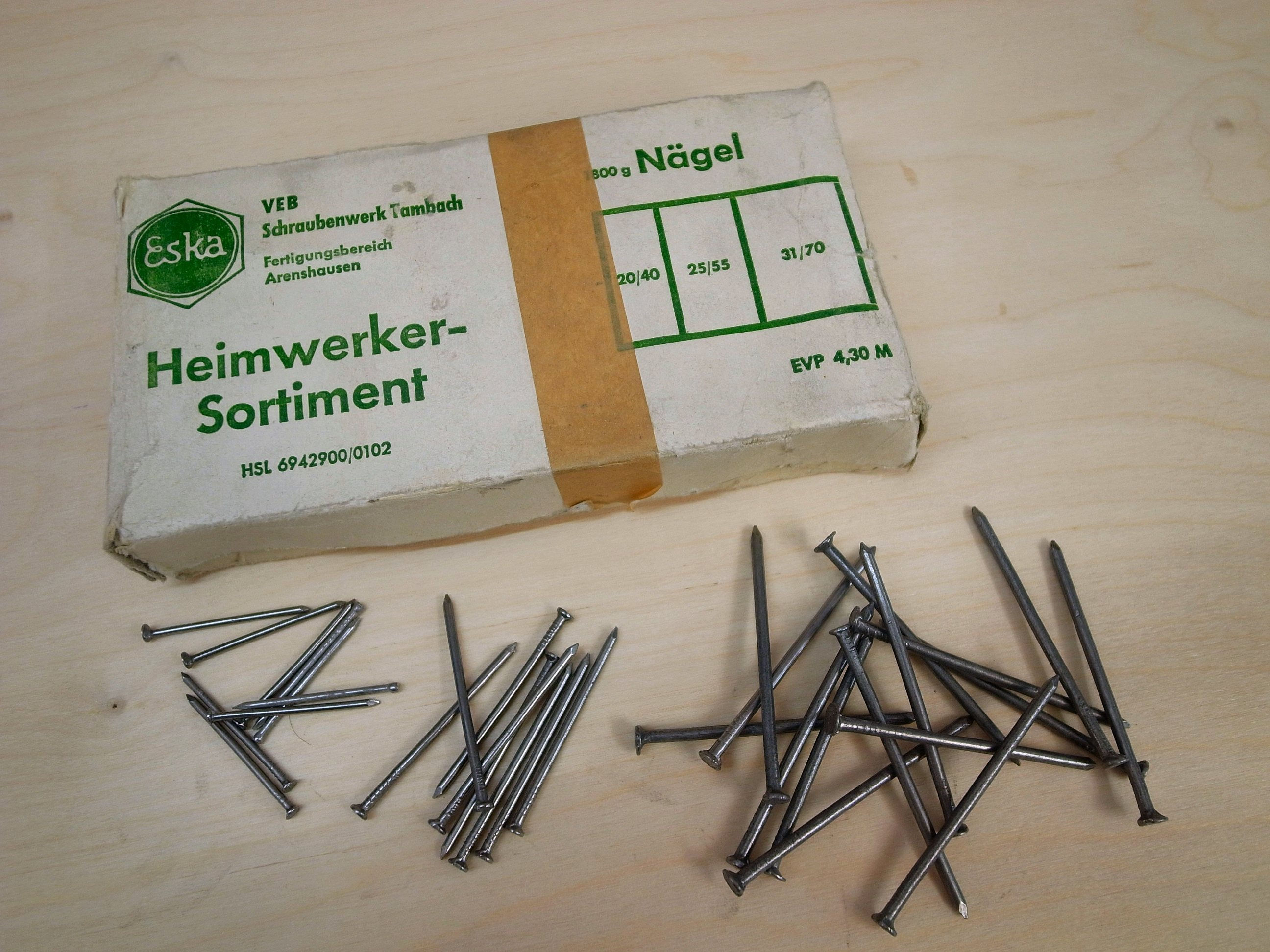 ESKA,Heimwerker-Sortiment Nägel, VEB Schraubenwerk Tambach, Fertigungsbereich Arenshausen